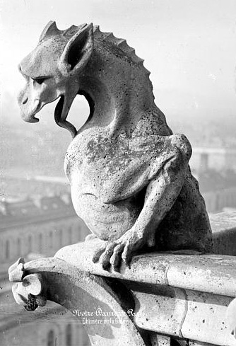 Galerie de la façade ouest : chimère